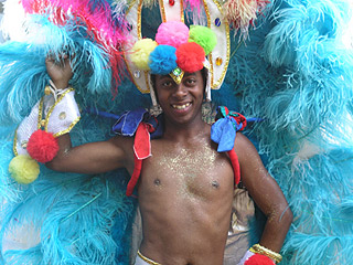 Public Domain - Quelle: Die Erlaubnis wurde per e-mail noch einmal bestätigt. --Rossi 18:34, 4. Jun 2004 (CEST)